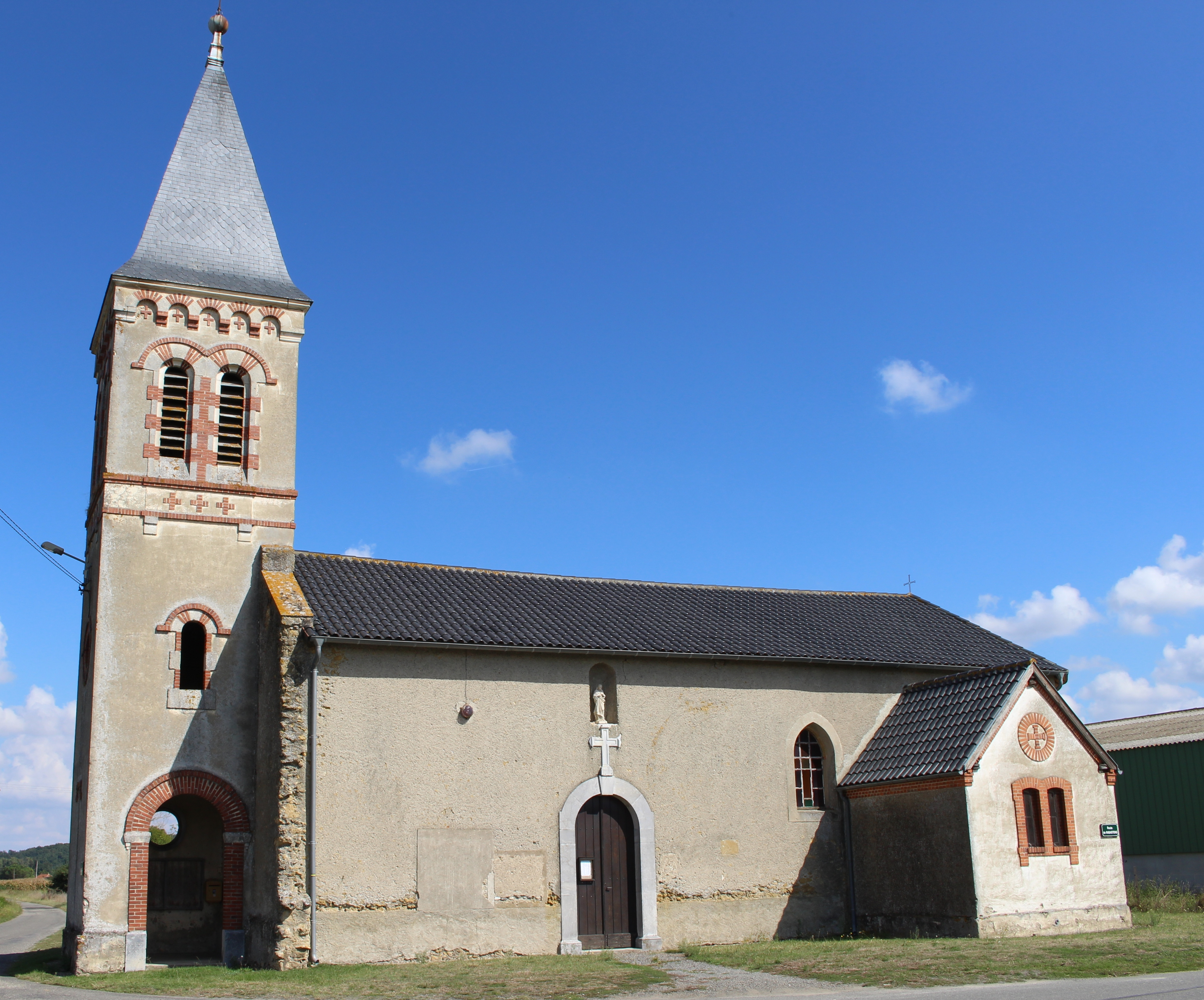 Église de la Nativité-de-la-Sainte-Vierge de Ségalas (Hautes-Pyrénées)